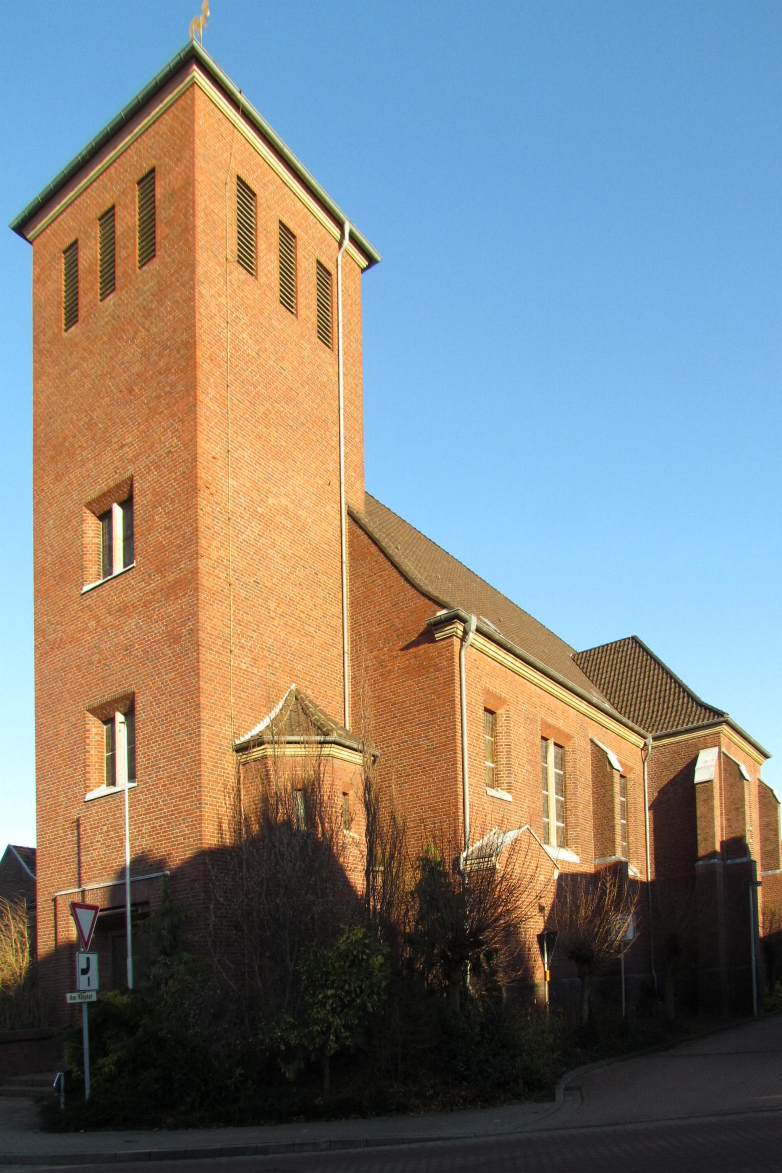 Kirchen und Kapellen in Erkelenz